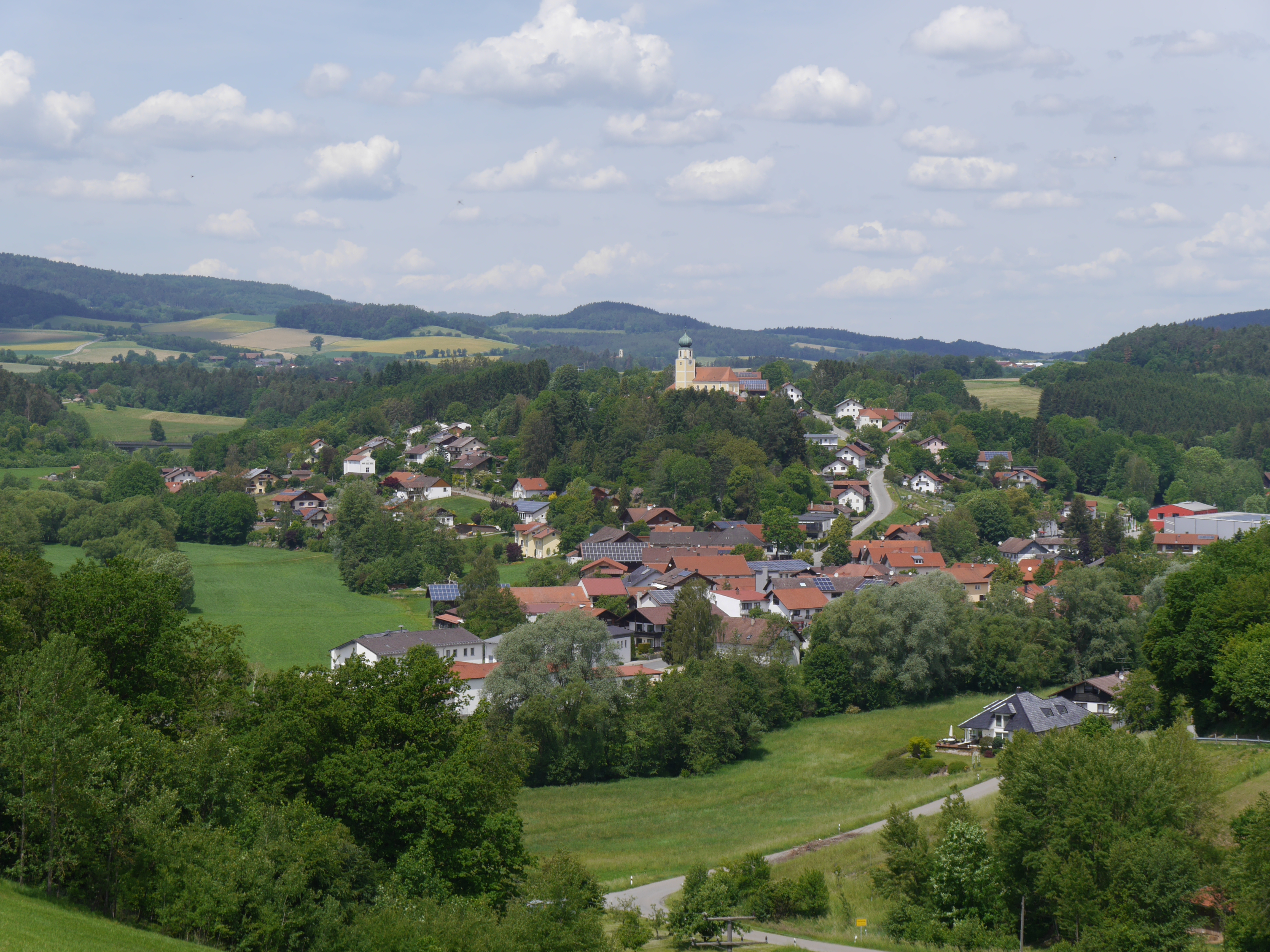 Ansicht von Stallwang von Stubenhof aus: Straubinger Straße, Dorfplatz, Kirchberg